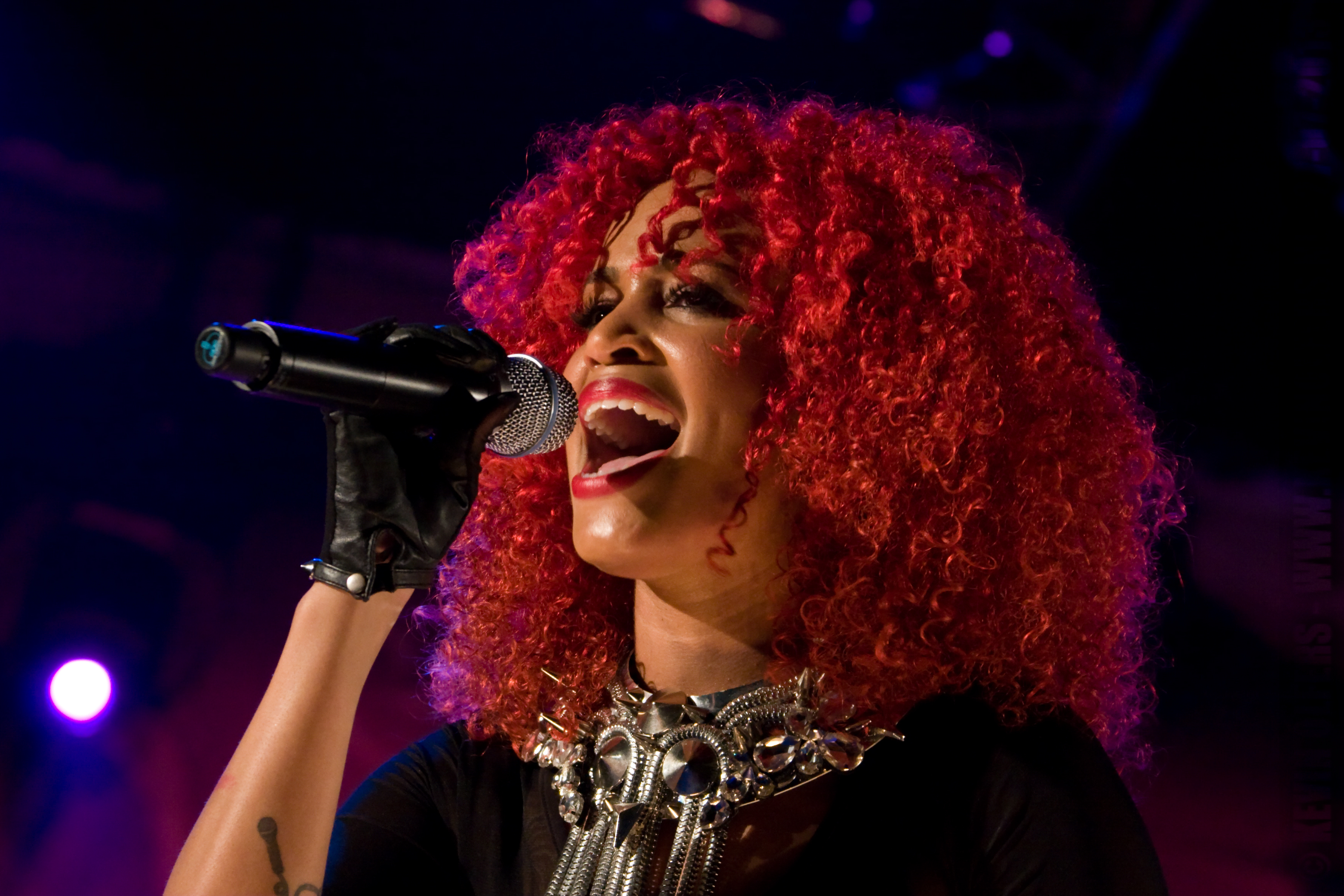 Sharon Doorson